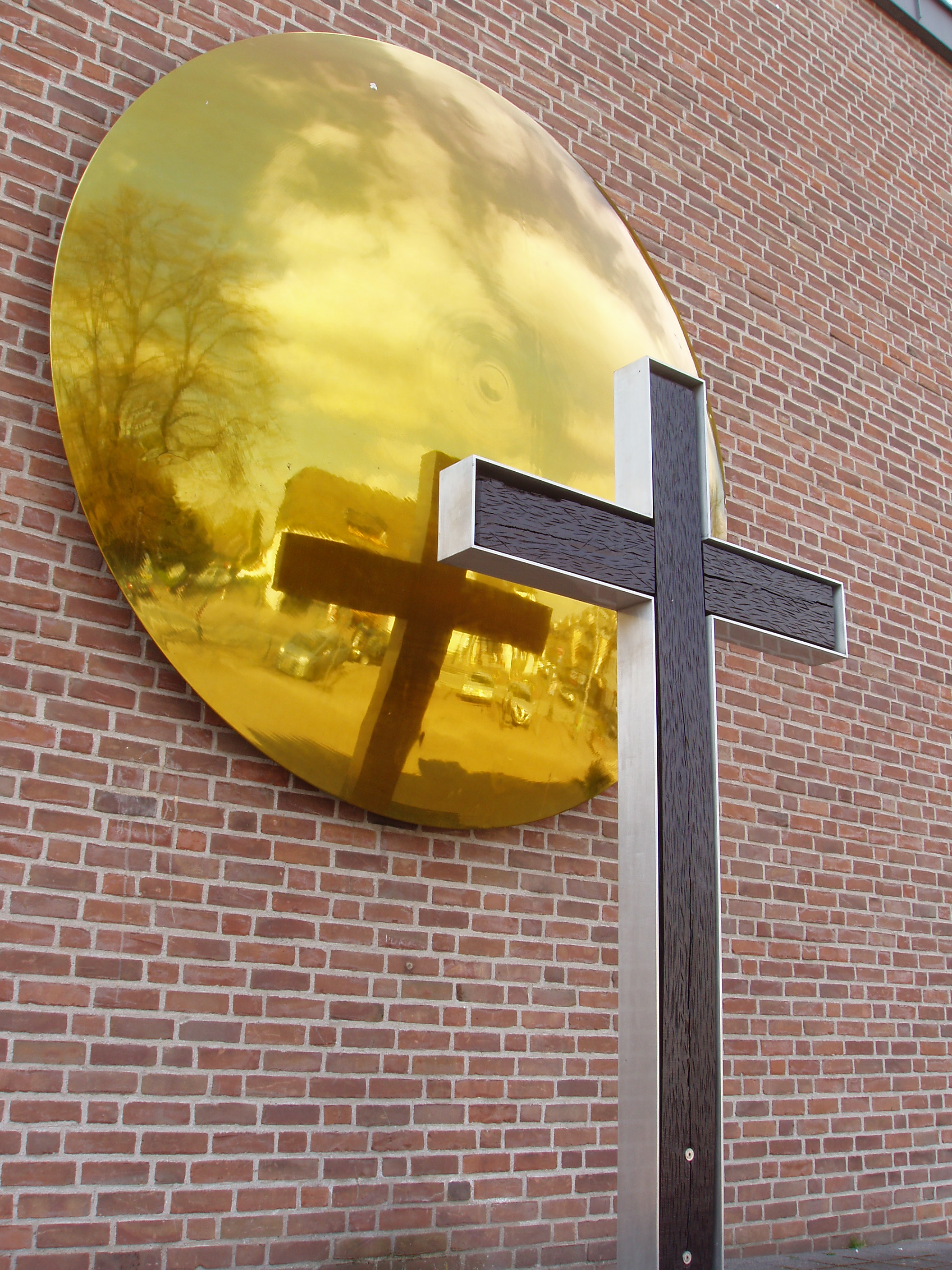 Weltenspiegel und Kreuz aus der ehemaligen Piuskirche vor der Kirche St. Martin in Langenfeld-Richrath